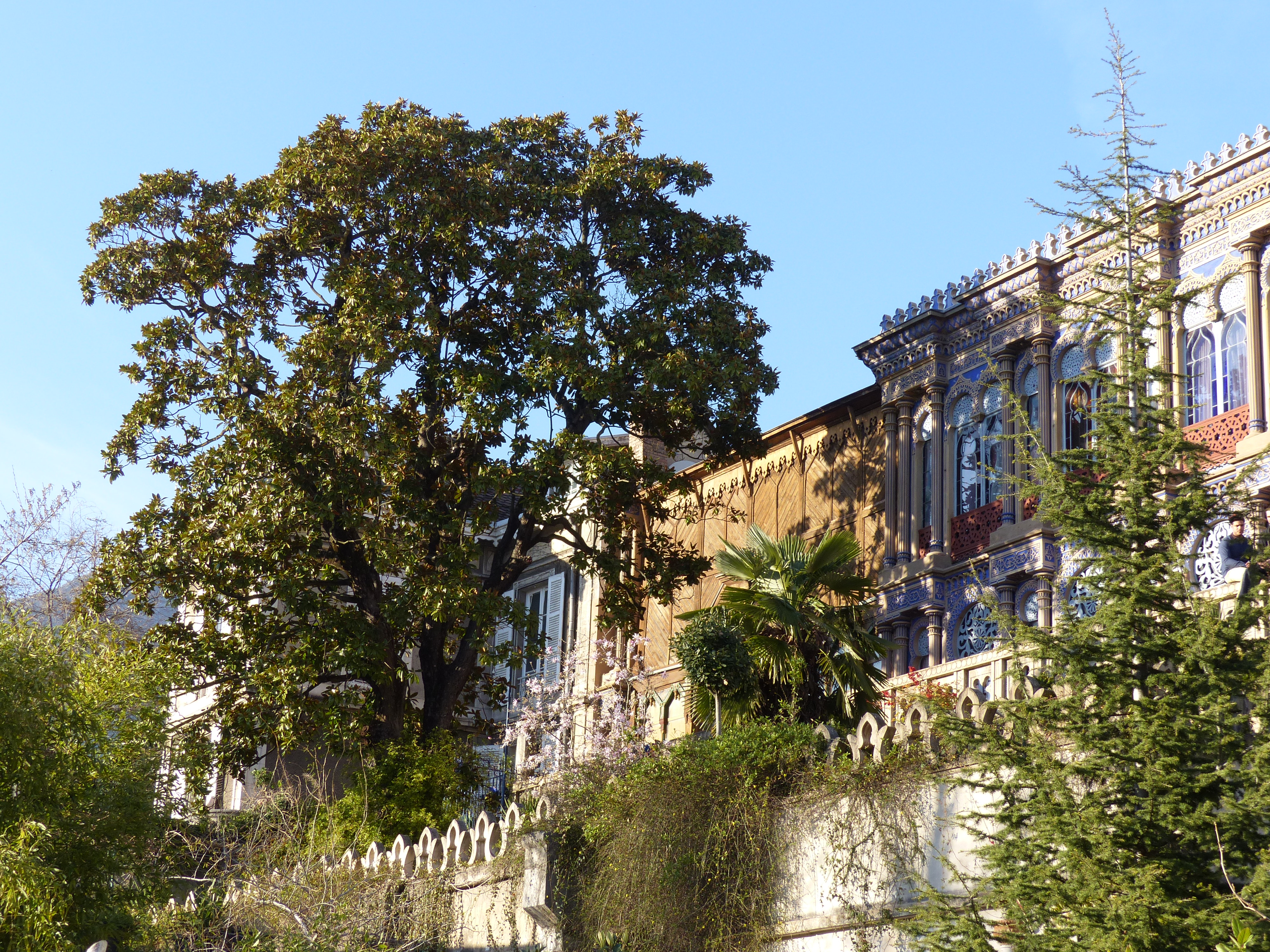 La Casamaures, Saint-Martin-le-Vinoux, Isère, France. Cette photo fait partie d'une série de 30 photos. Don à Wikimédia par Sylvie Jeanson, à l'occasion des 30 ans de l'association "La Casamaures d'hier et d'aujourd'hui", dans le cadre des Journées contributives à la Casamaures du 4 et 5 avril 2015. Photo autorisée par l'association et par la proprietaire Christiane Guichard. La Casamaures : Façade Ouest et le Magnolia classé Arbre Remarquable de France.